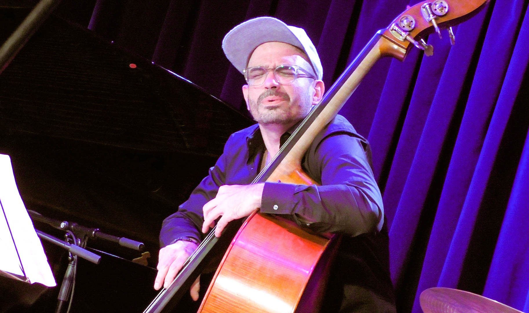 12.03.2017. Еврейский культурный центр на Никитской.